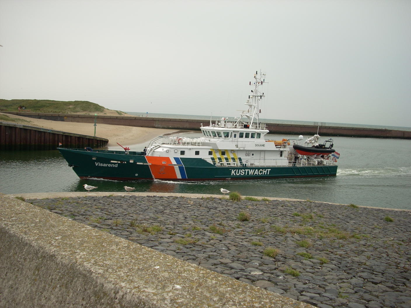 Nederlandse Kustwacht's Visarend entering The Port of Scheveningen